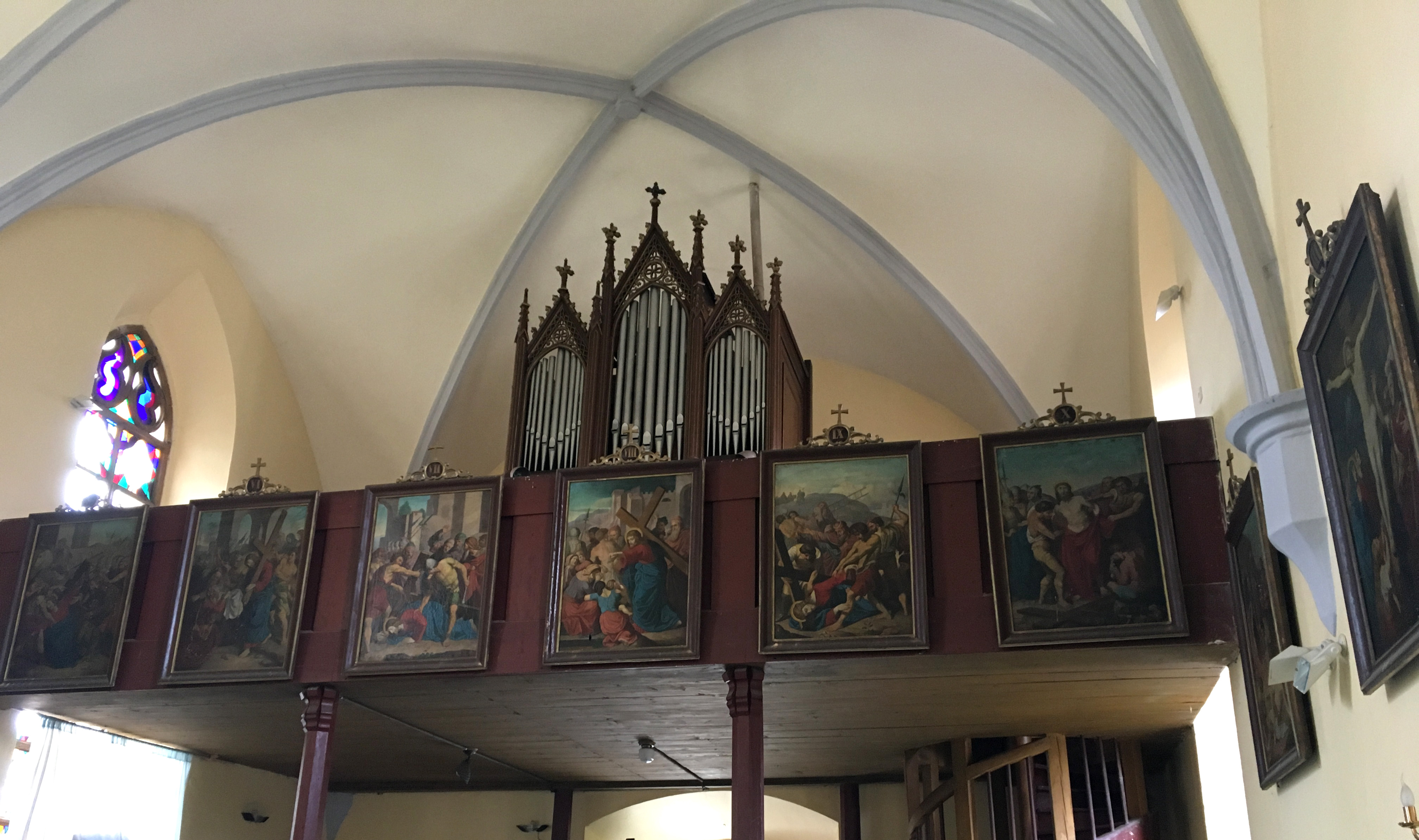 Kostel sv. Vavřince, kruchta